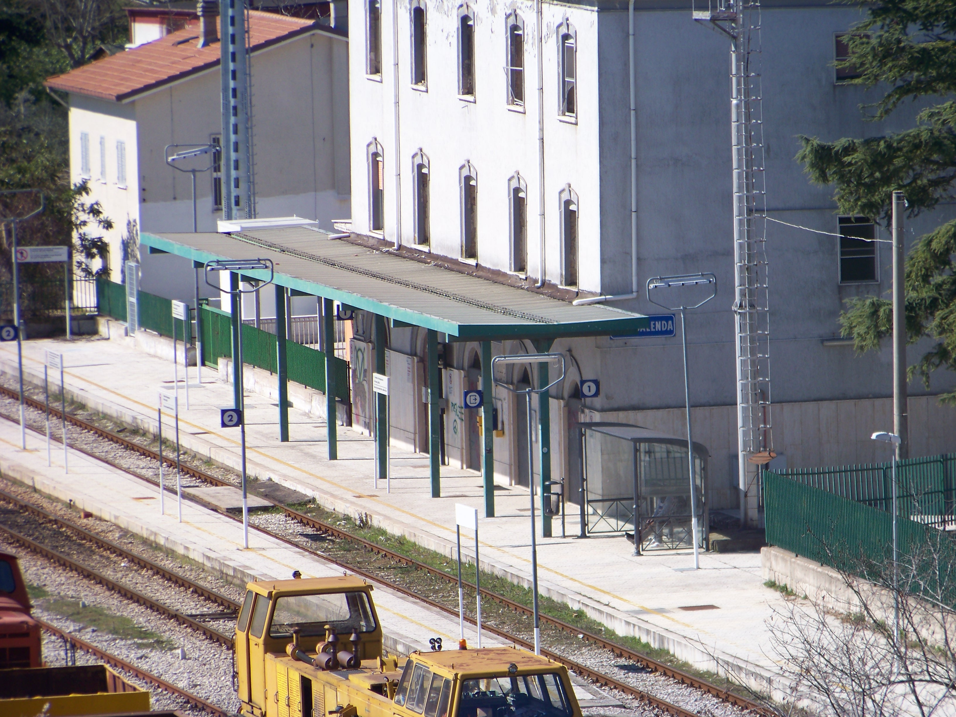 Binari stazione di Casacalenda -Guardalfiera